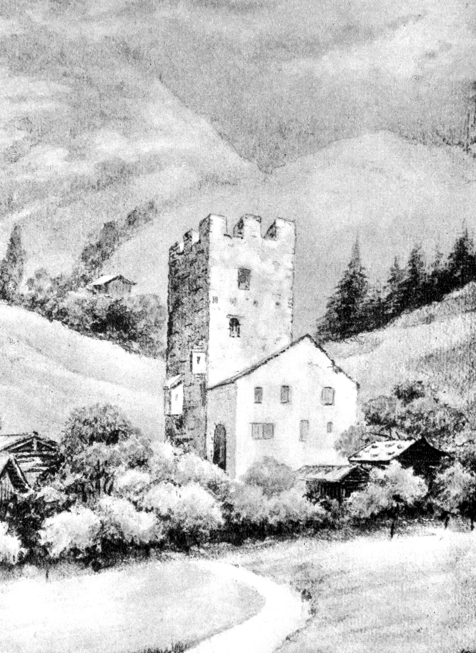 Campell 1894; Zeichnung von F. Küpfer